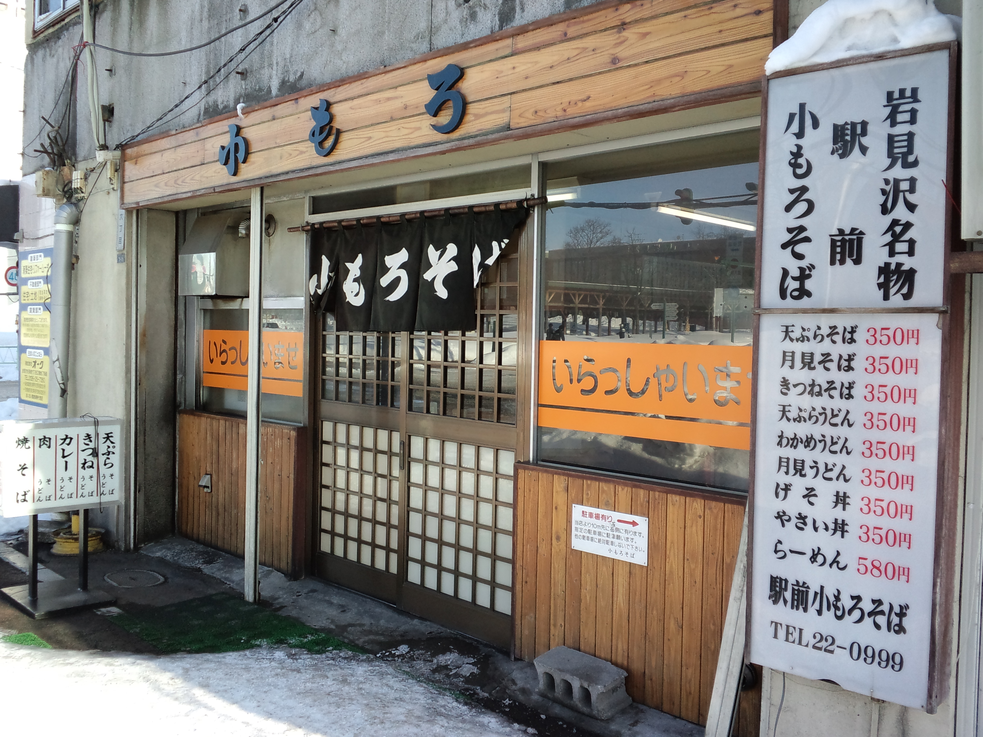 小もろ蕎麦店